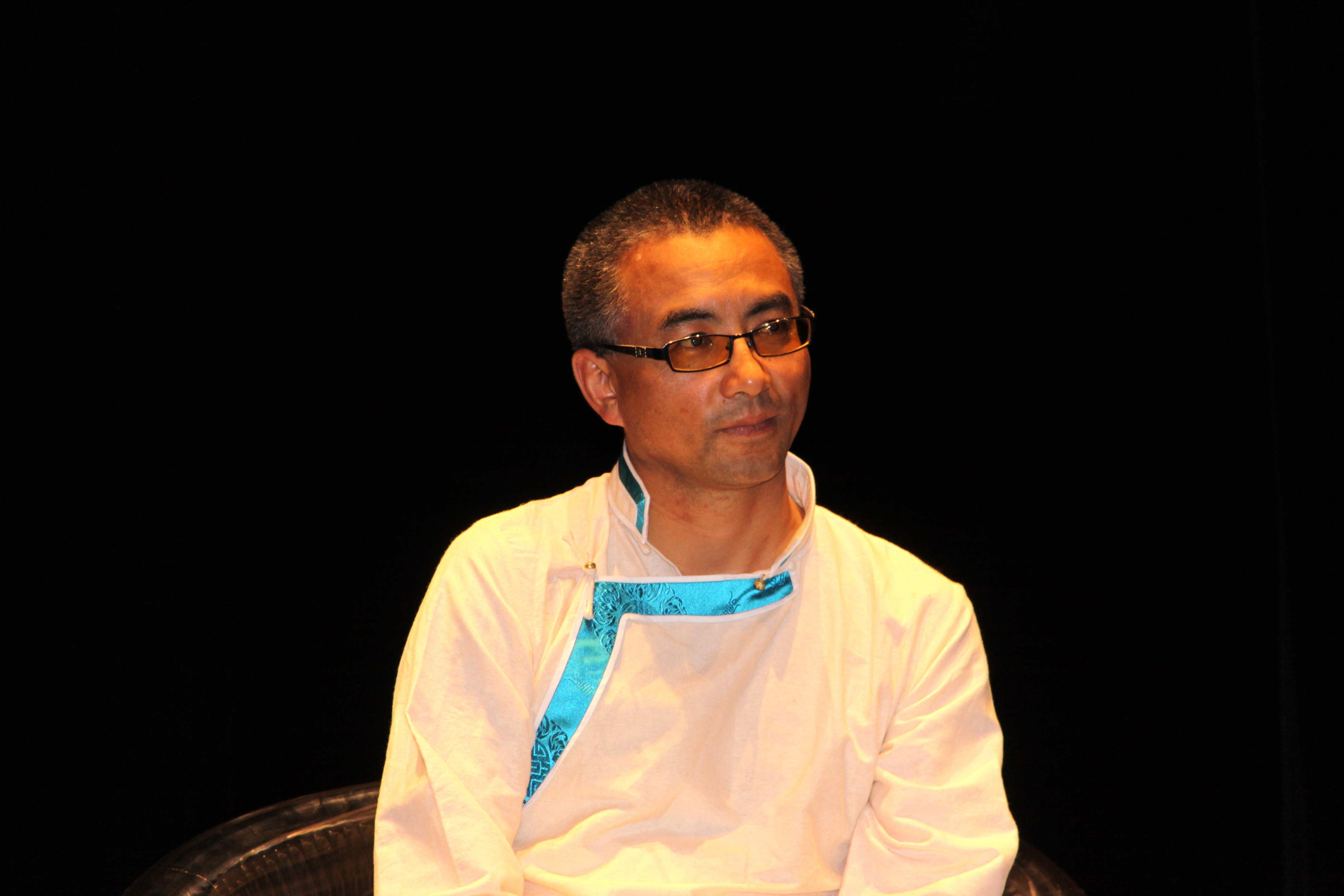 L' écrivain, scénariste et réalisateur tibétain Pema Tseden durant les Rencontres avec les réalisateurs au théatre Verdière de la Coursive (jeudi 5 juillet 2012 à 16h15) lors du Festival International du Film de La Rochelle 2012. La Rochelle, Charente Maritime, France.